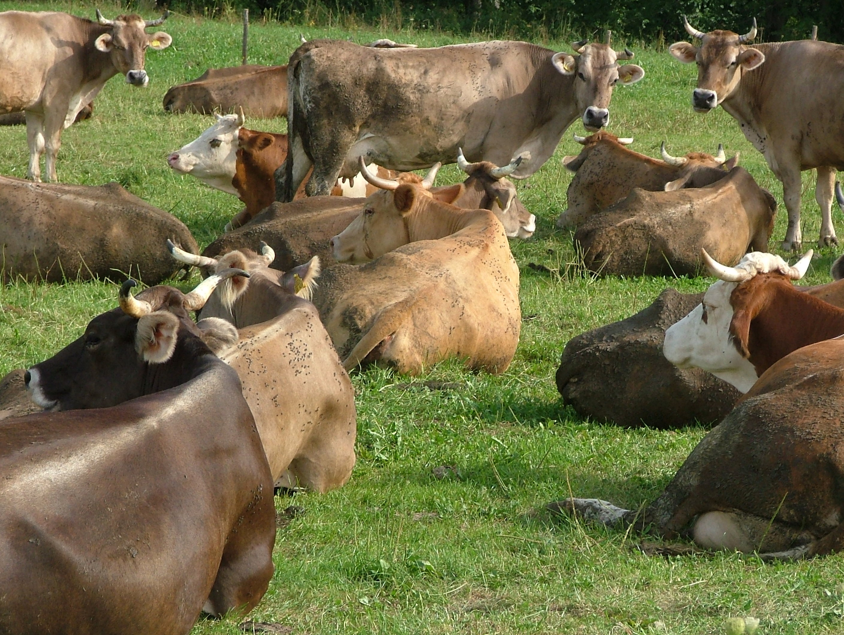 Kühe mit Hörner